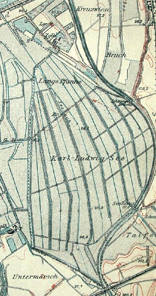 ehemalige Fläche des Karl-Ludwig-See bei Ketsch Repro M. Linnenbach (abgelichtet aus der geologischen Grundkarte des Großherzogtums Baden von 1898) GNU, FDL